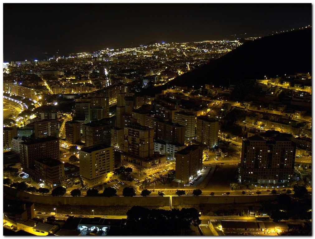 Residencial Anaga